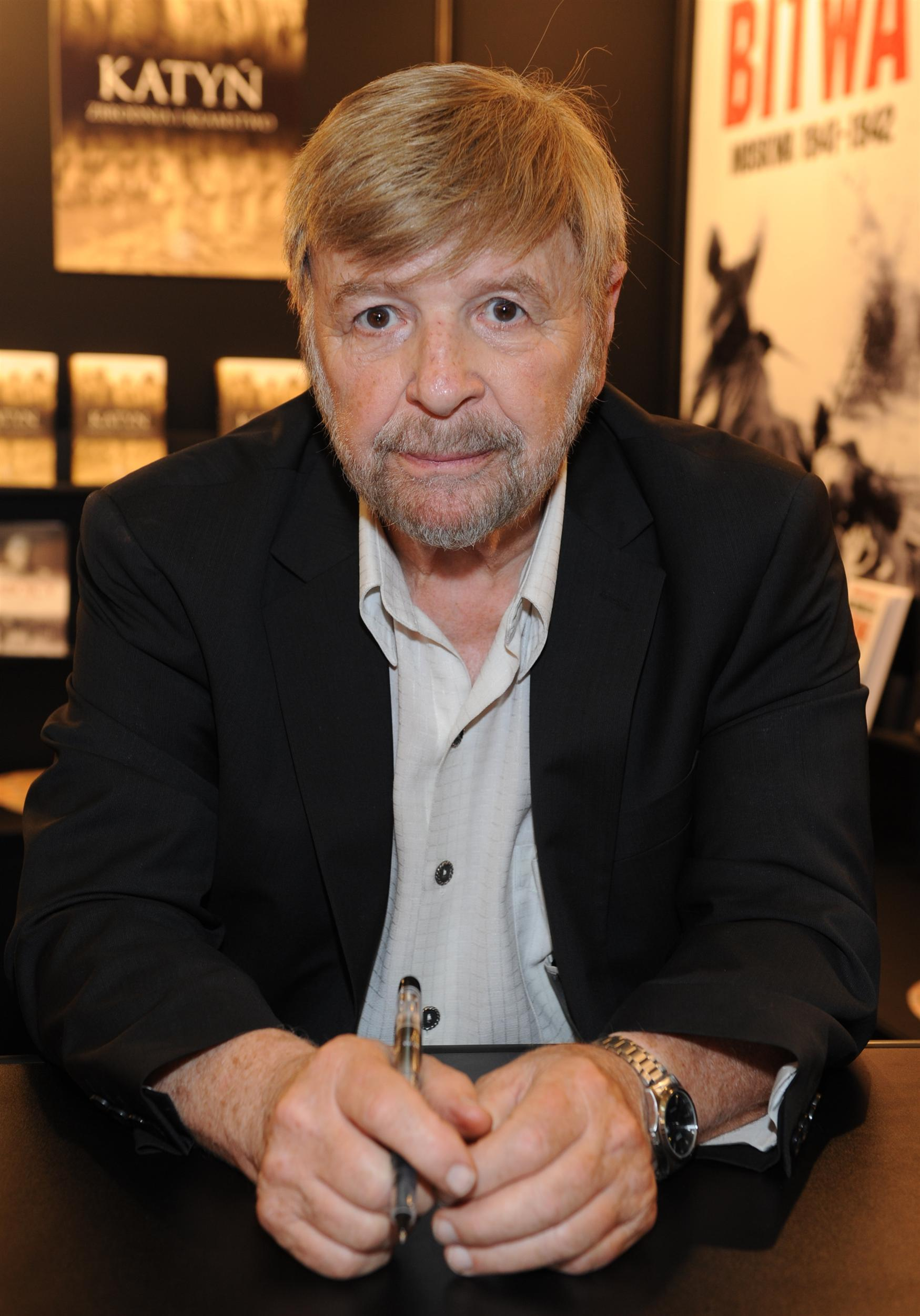 Szewach Weiss